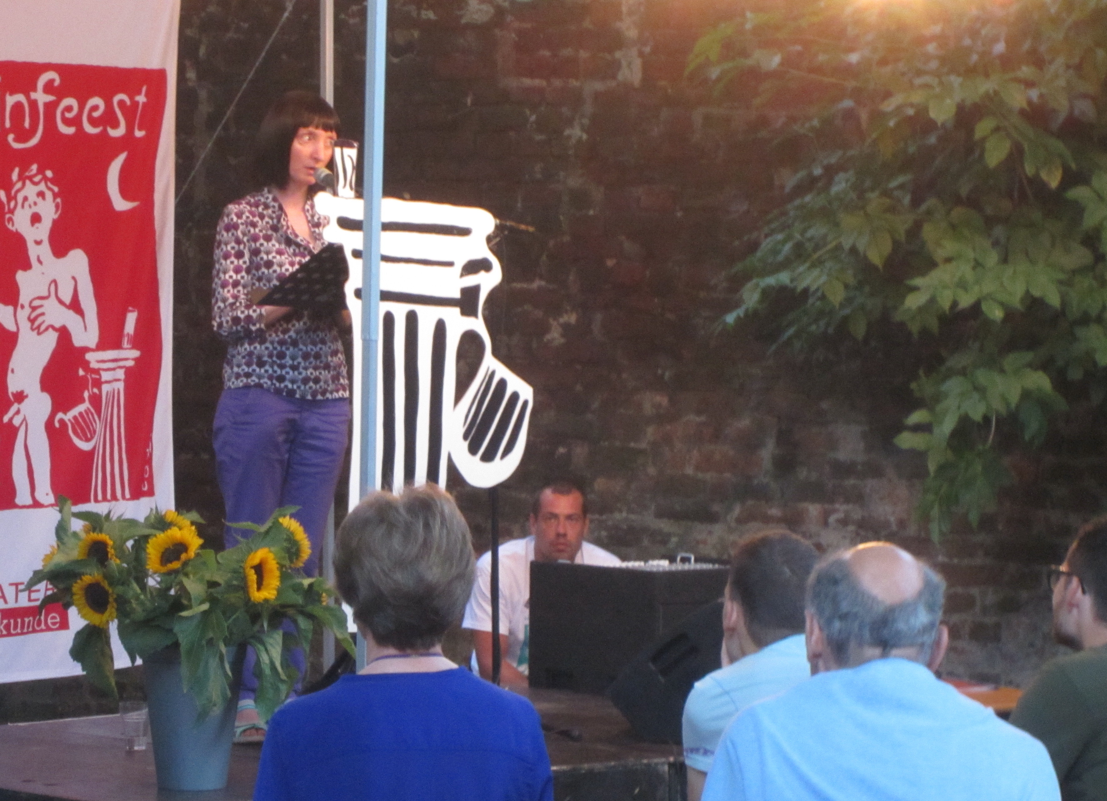 Delphine Lecompte op Het Tuinfeest te Deventer, 3 augustus 2013.